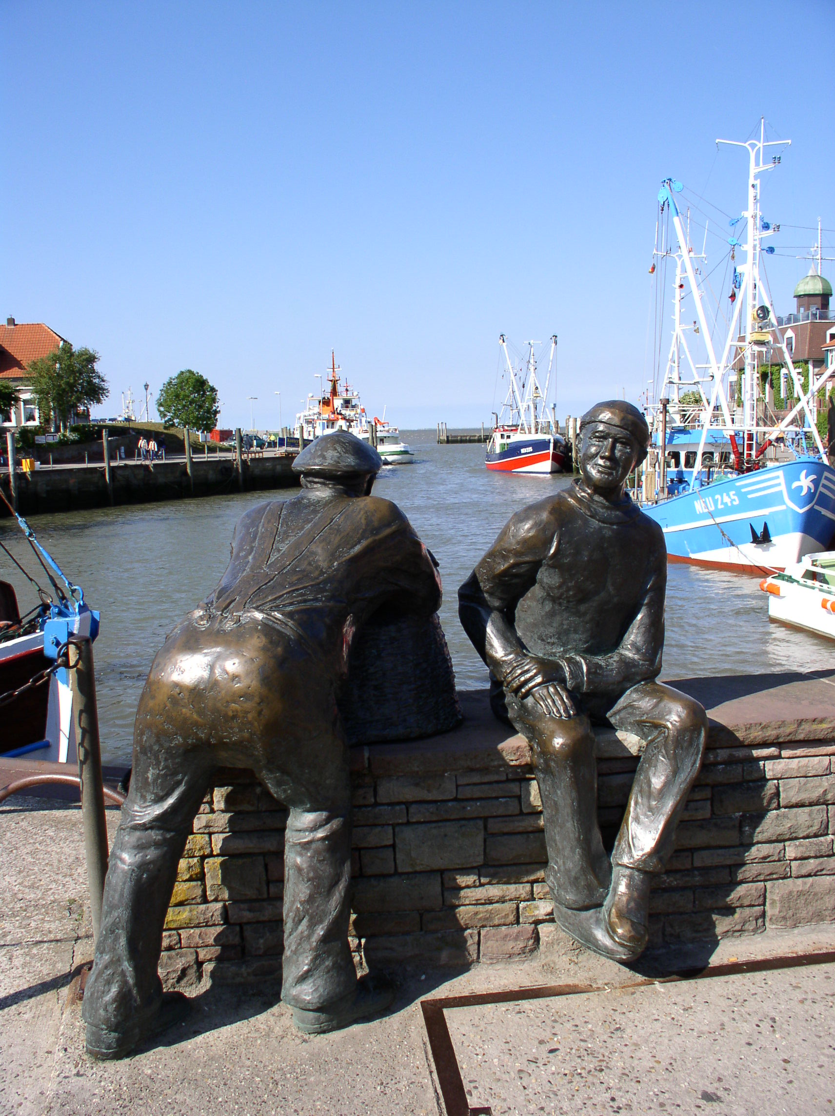 Fischerstatuen Neuharlingersiel